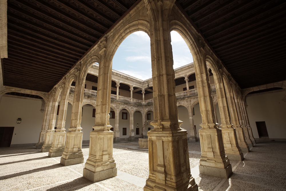 Patio del Palacio de Avellaneda, Peñaranda de Duero (Burgos).